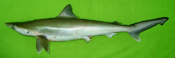 серая длиннорылая акула